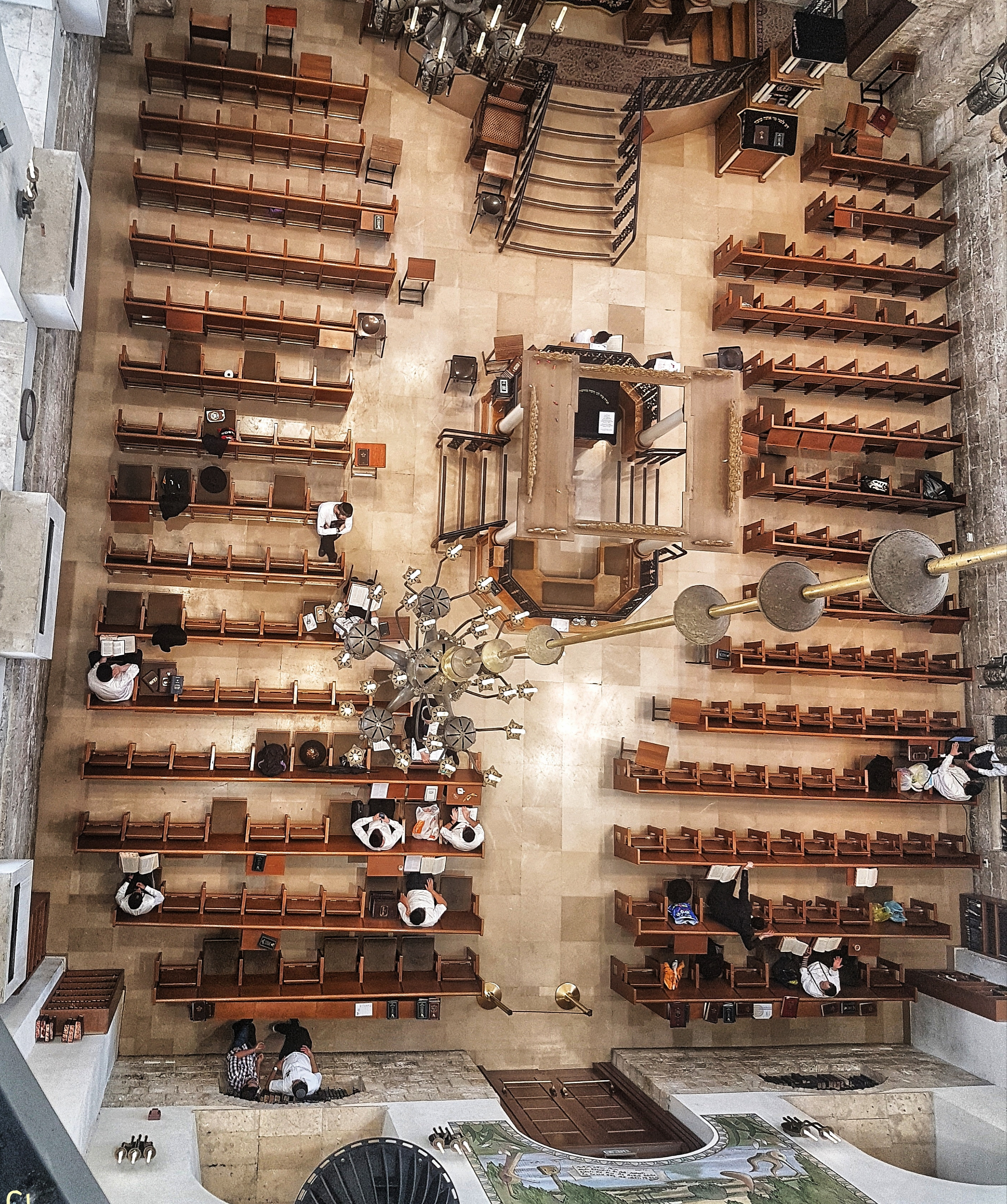 בית הכנסת החורבה או חורבת רבי יהודה החסיד הוא בית כנסת במרכז הרובע היהודי בעיר העתיקה. הוא נבנה לראשונה ב-1700 על ידי חבורת רבי יהודה החסיד ונחרב פעמיים עד שנבנה בשלישית ב-2010.